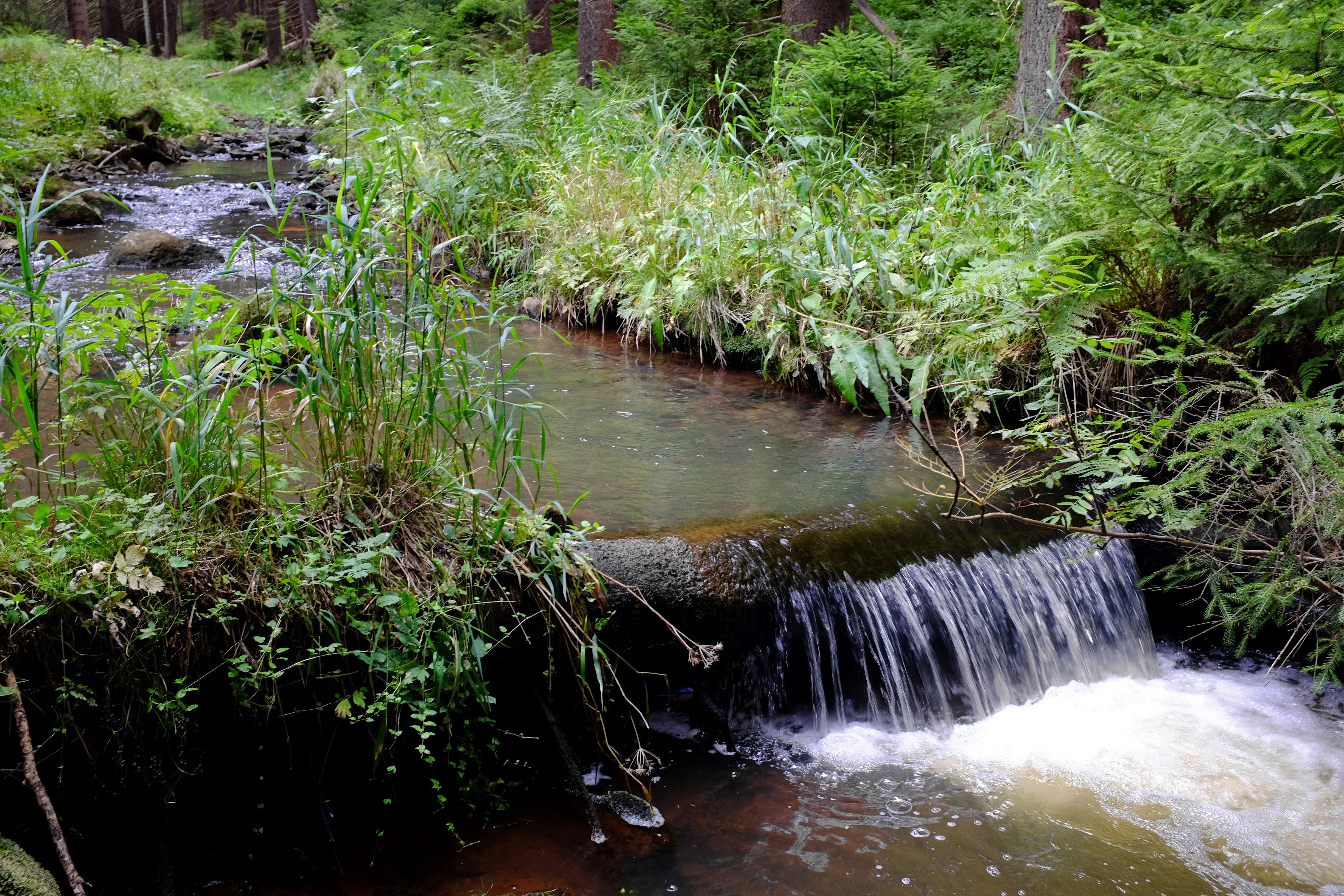 Blatenský potok u Horní Blatné, Krušné hory, okres Karlovy Vary